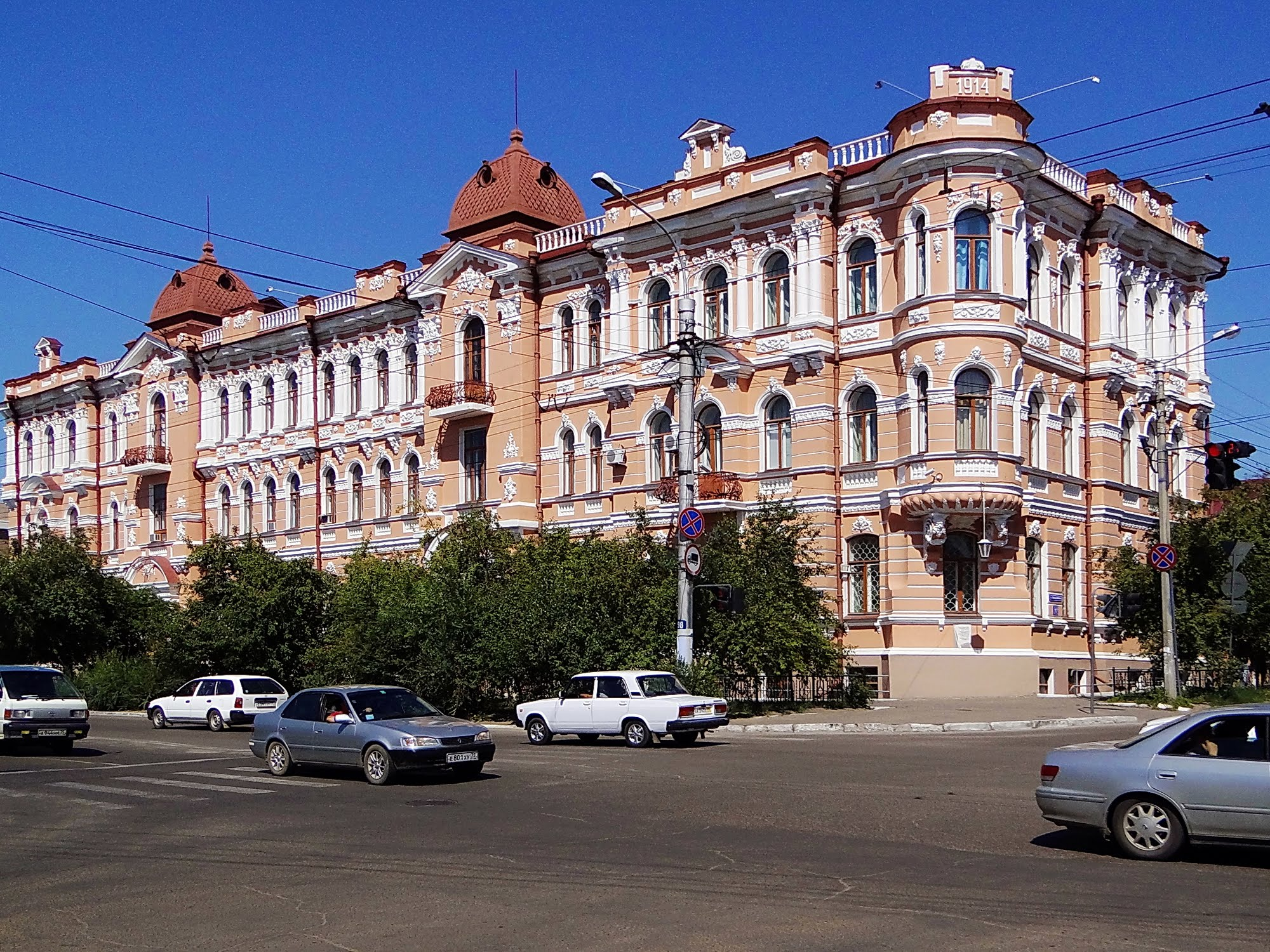 Дом купцов Шумовых: улица Ленина, 84, Чита, Забайкальский край